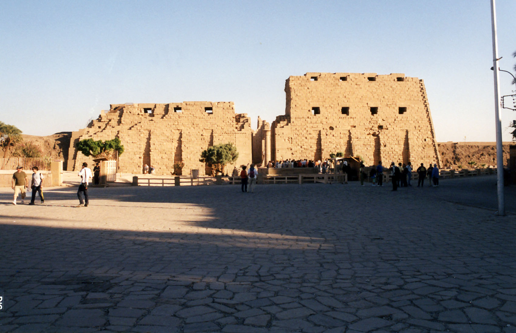 Autore: Hotepibre (Giuseppe); LocalitÃ e data: karnak, dicembre 2000; Soggetto: il I Pilone (XXX Dinastia)